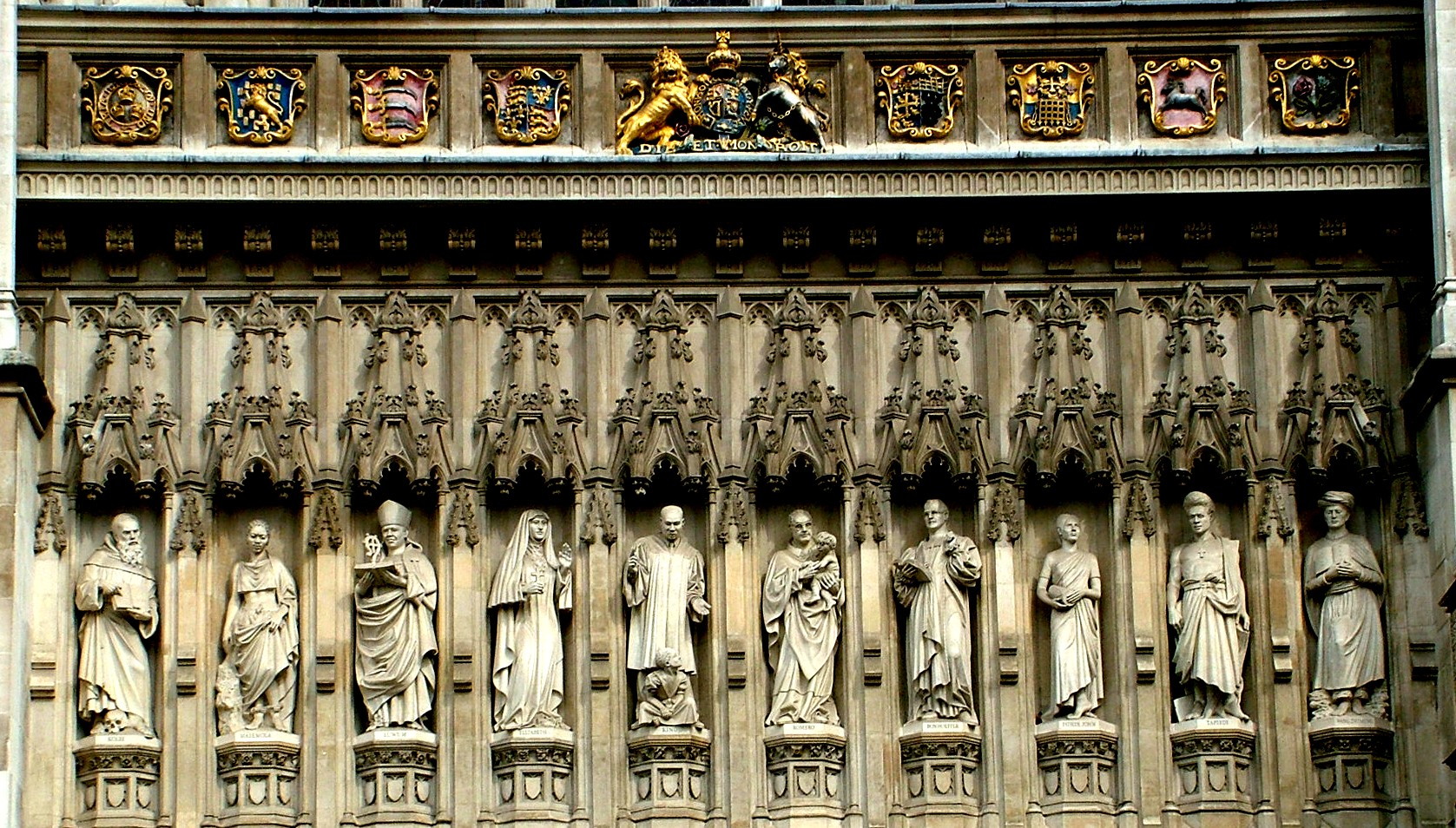 Westminster-apátság, a 20. század mártírjainak szobra (London, Egyesült Királyság)